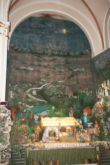 Crib in Katowice Panewniki, Poland (2008)